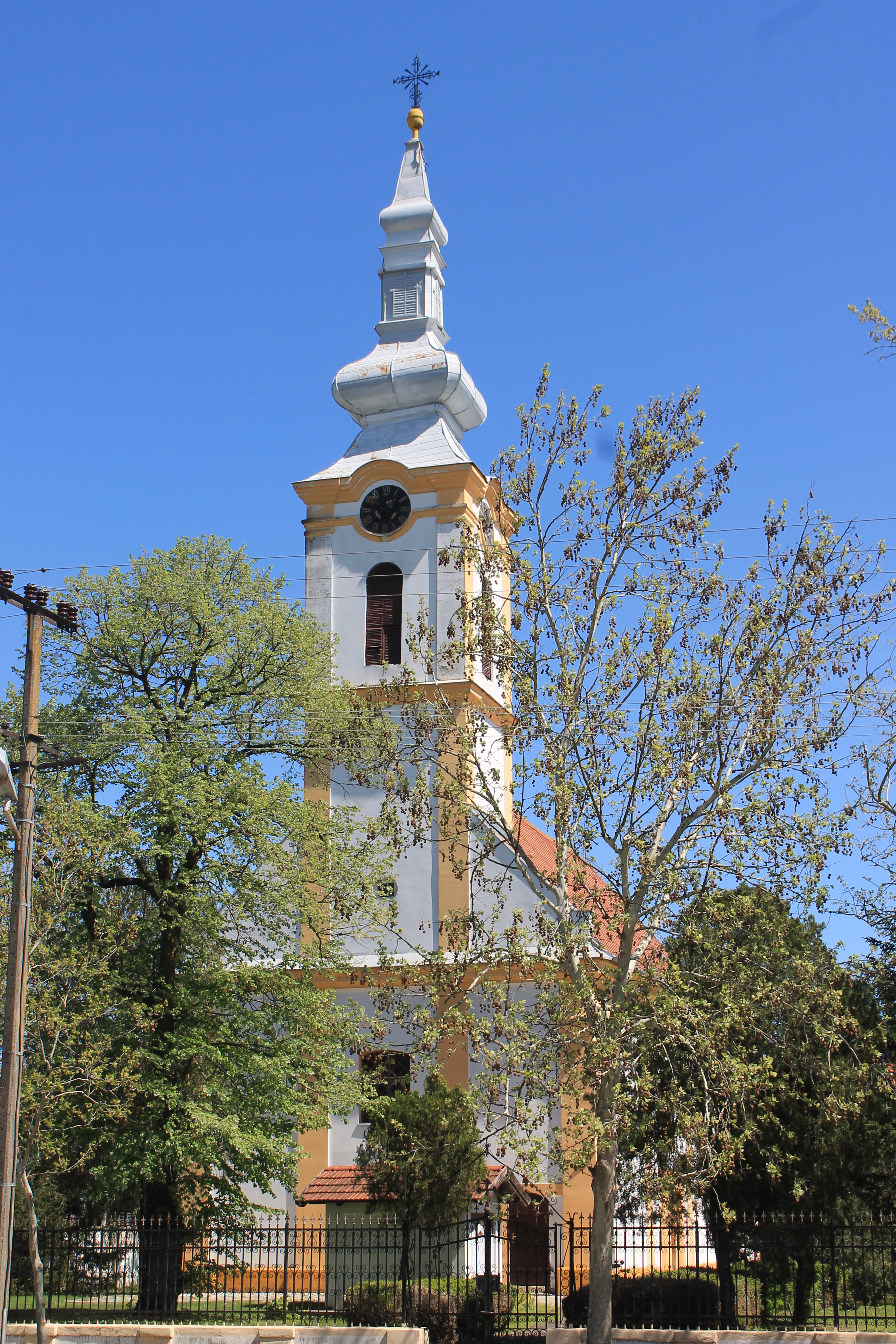 Beška